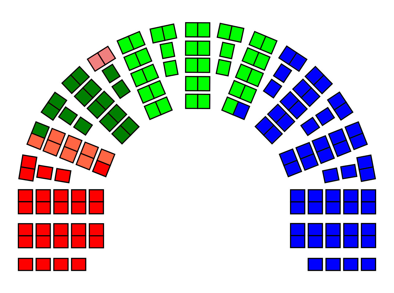 Mandatfordelingen etter Stortingsvalget 1921 illustrert med seter Arbeiderpartiet Norges Socialdemokratiske Arbeiderparti Bondepartiet Radikale Folkeparti Venstre Høyre